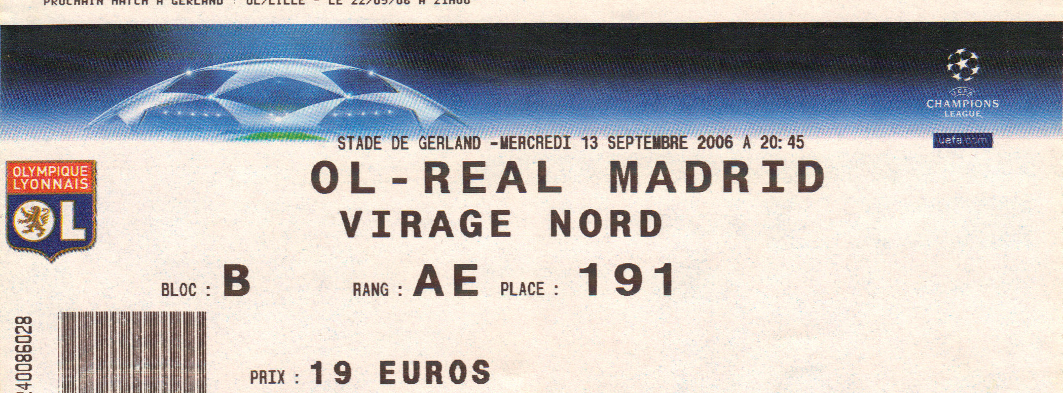 Billet d'entrée pour le match OL-Real Madrid du 13 septembre 2006